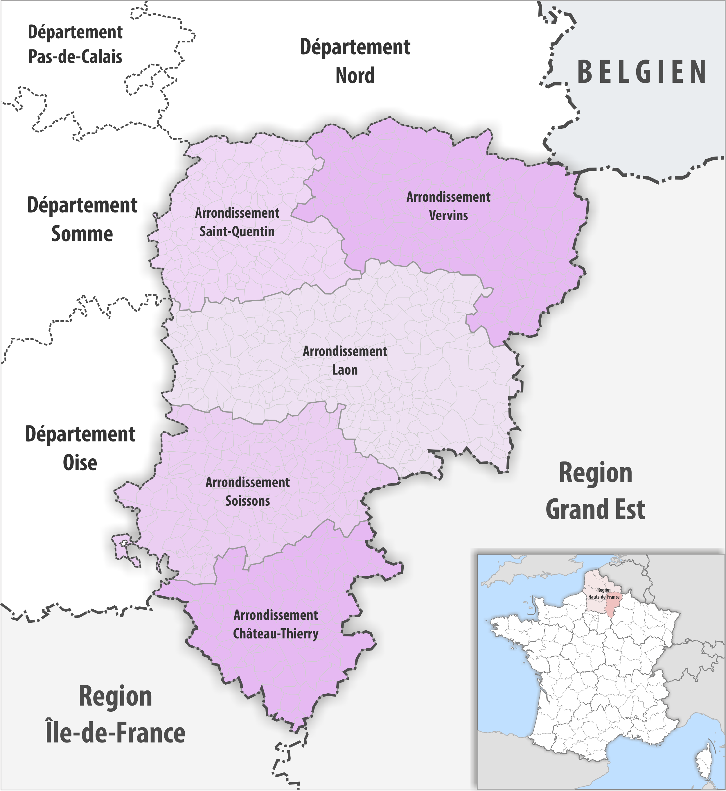 Gemeinden und Arrondissemente im Departement Aisne